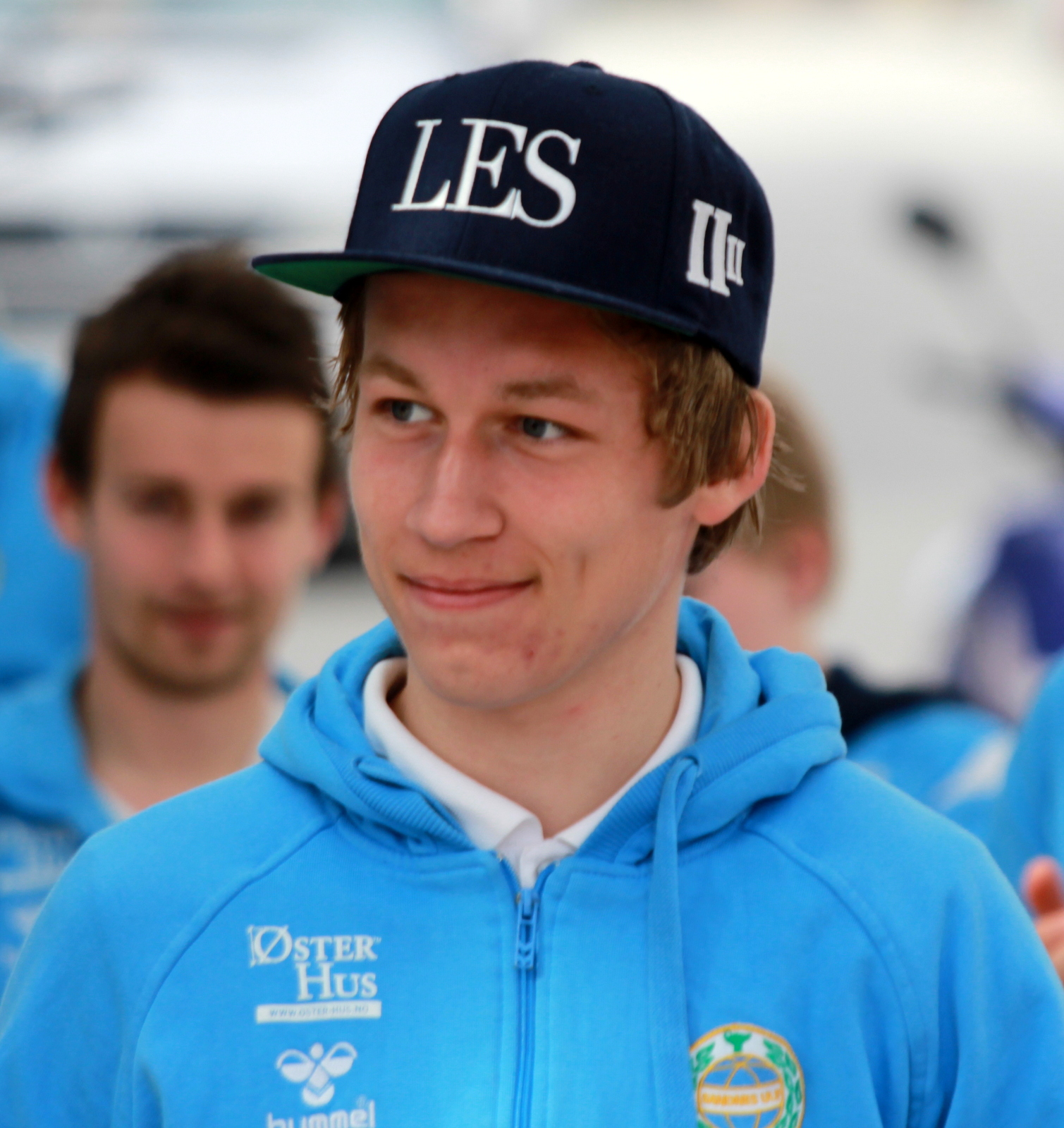 Niklas Sandberg foran 2014 sesongen for Sandnes Ulf